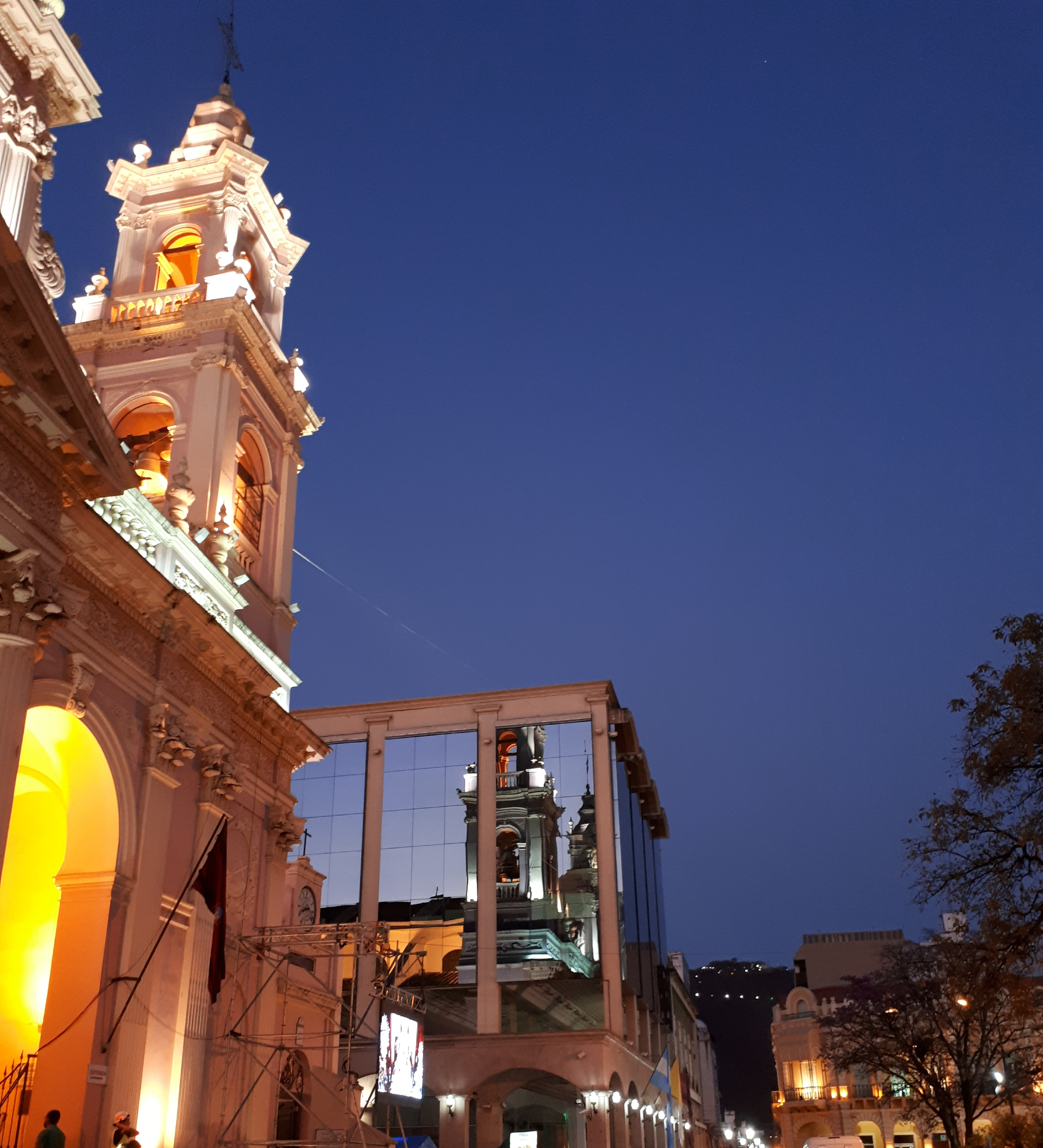 La catedral basílica, santuario del Señor y la Virgen del Milagro, de estilo arquitectónico neobarroco colonial. Construido por el arquitecto Felipe Bertrés. Data la construcción 1859-1882. La catedral alberga restos del gral. Martín Miguel de Guemes en el Panteón de las Glorias del Norte. Monumento histórico nacional año 1947Catedral Basílica de Salta